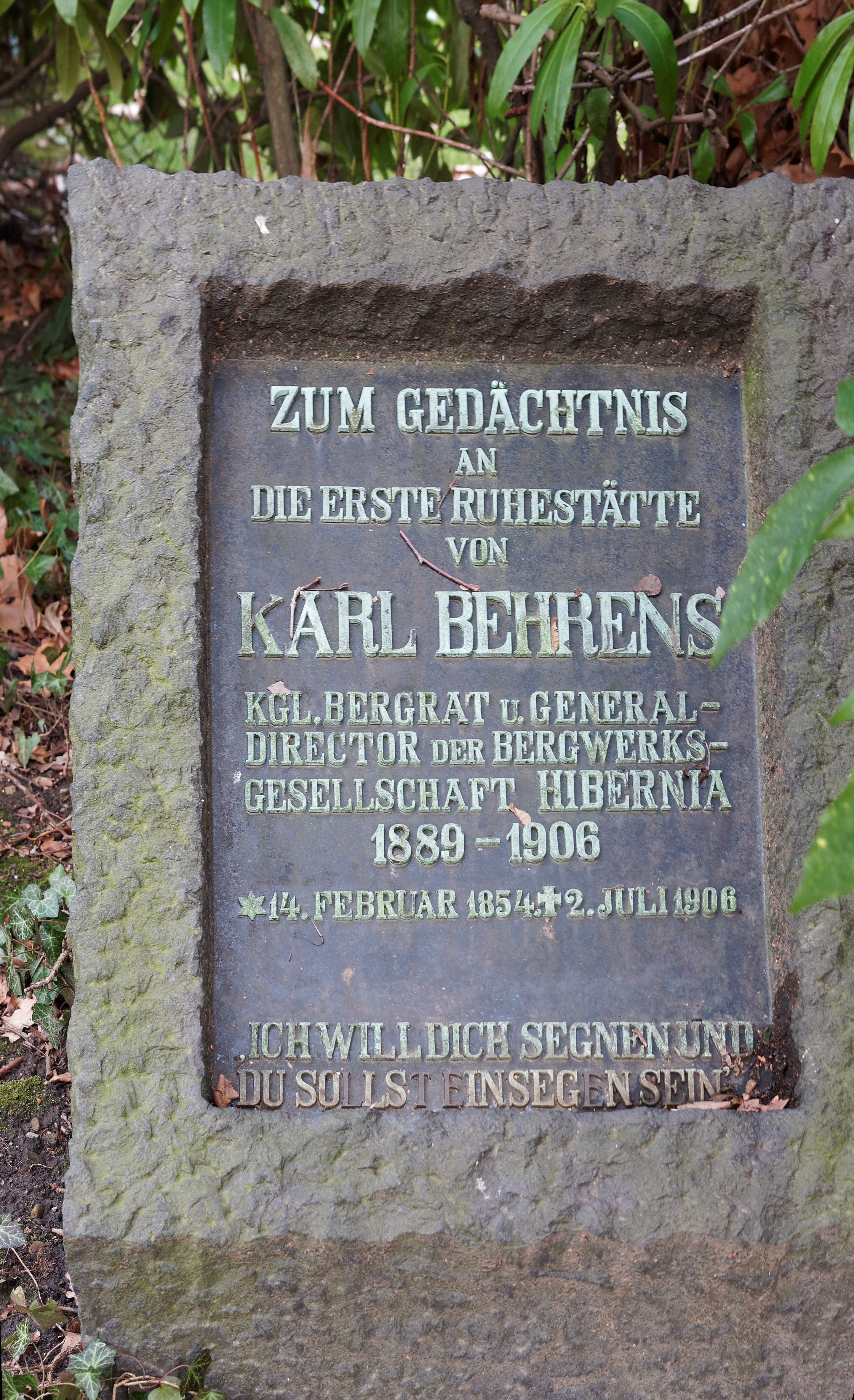 Gedenkstein für das Grab von Karl Behrens in Herne, dem ehemaligen Direktor der Hibernia Bergwerksgesellschaft